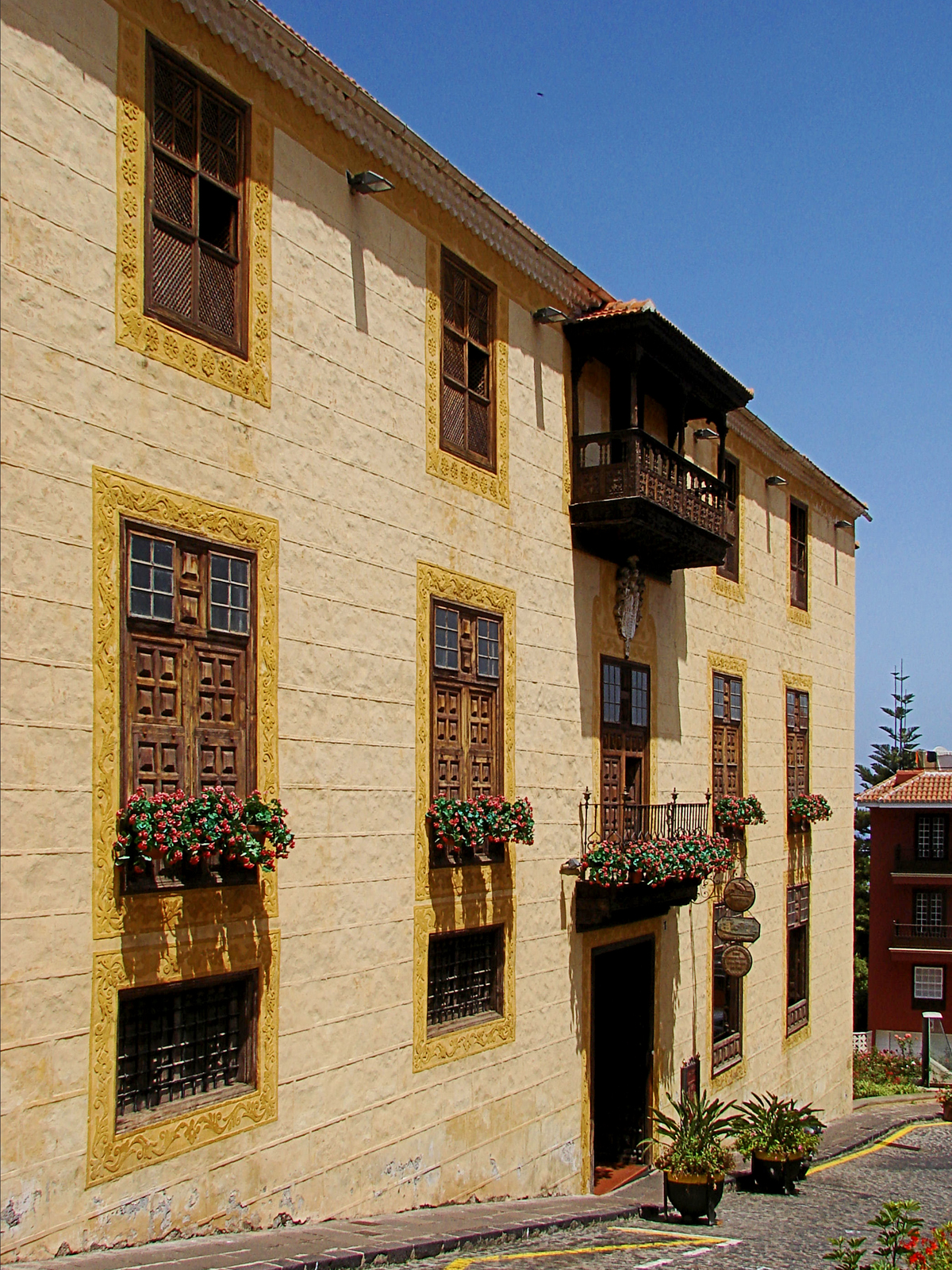 Casa Lercaro Fachada Este. Memoria Histórico artísitica de Casa Lercaro, La Orotava